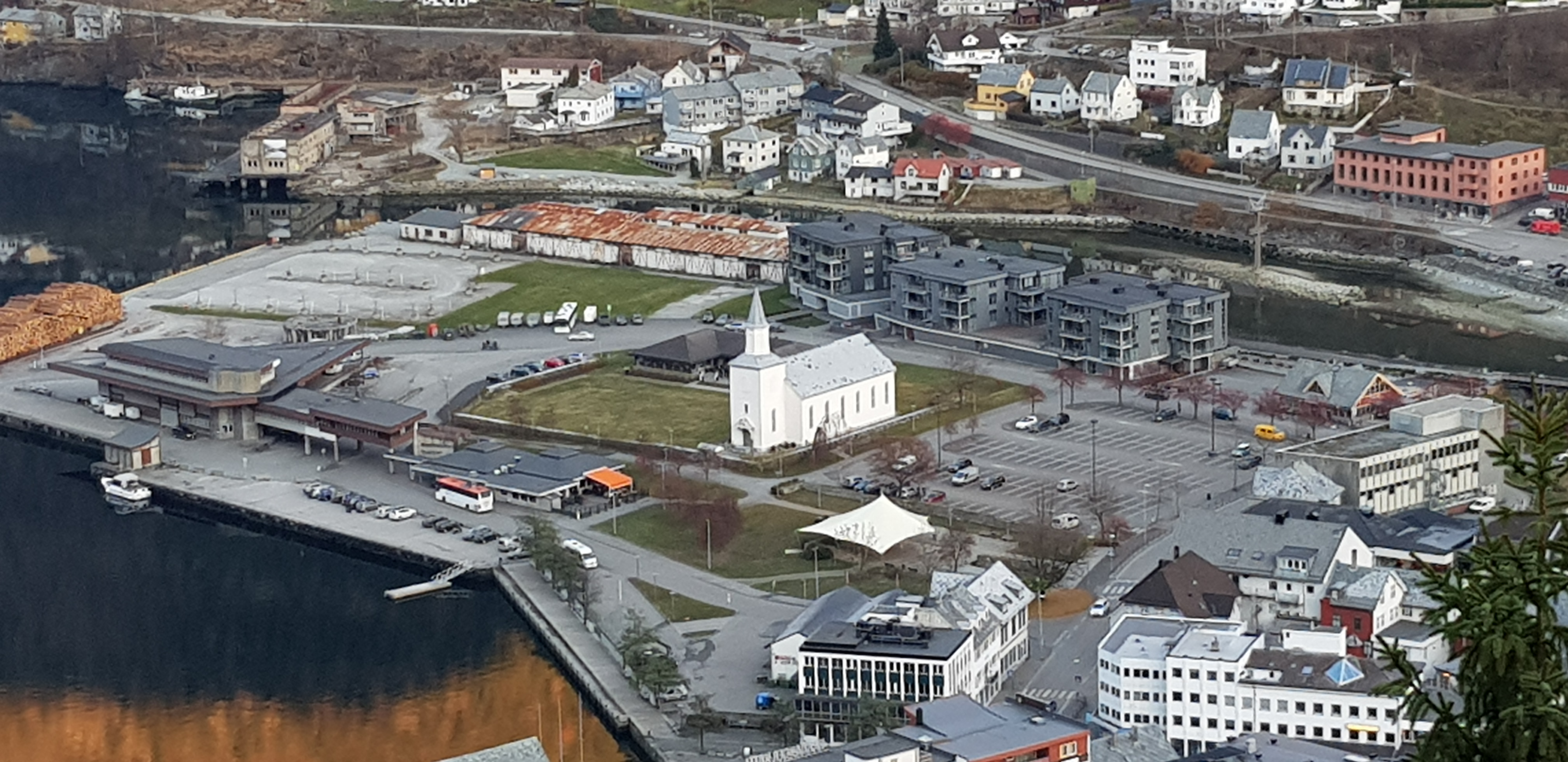 Oversiktbilde av Odda med kirken i midten.